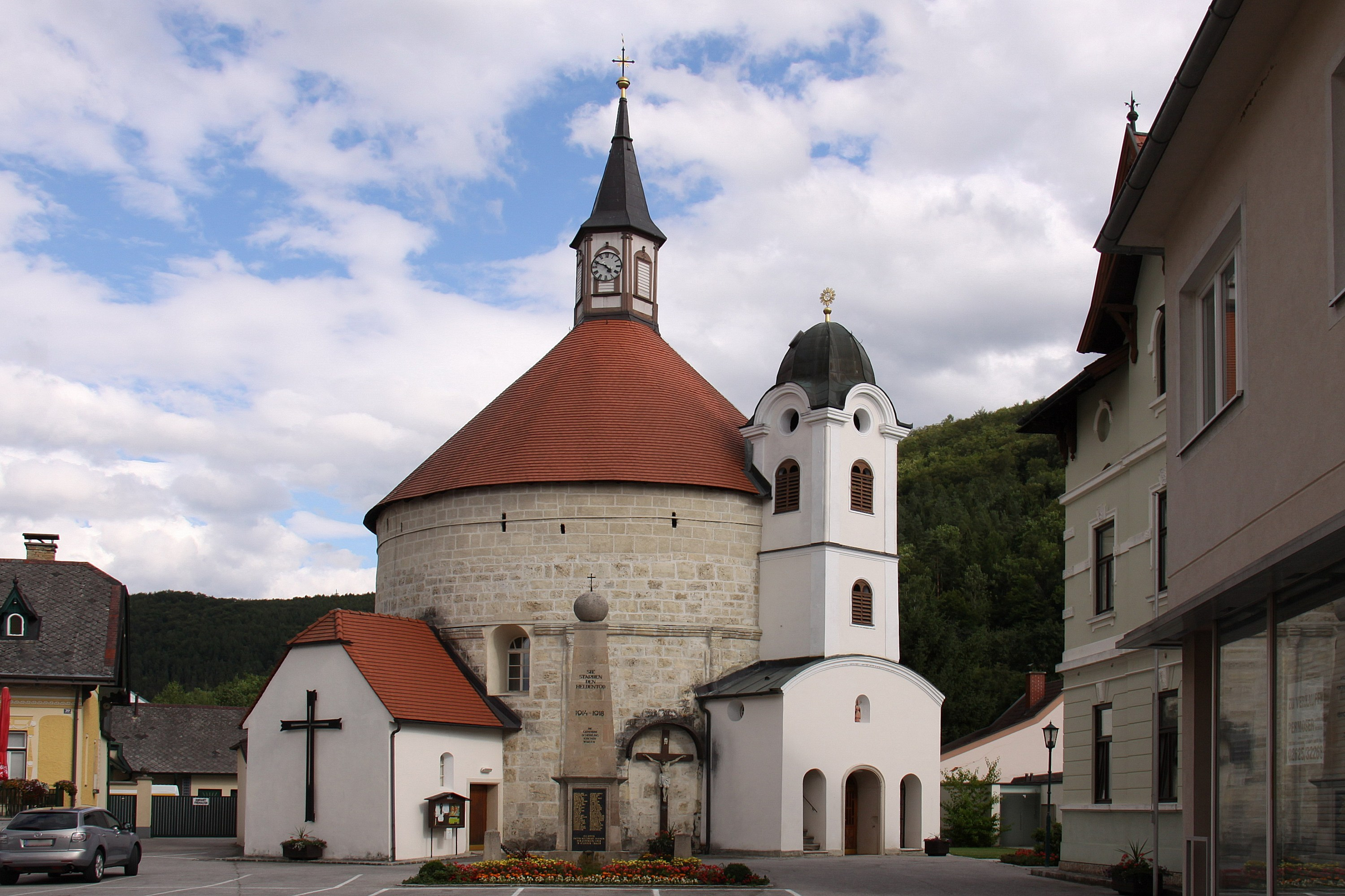 Denkmalgeschützte römisch-katholische Pfarrkirche hl. Maria Magdalena in Scheiblingkirchen-Thernberg. Object location47° 39′ 30.56″ N, 16° 08′ 08.23″ E